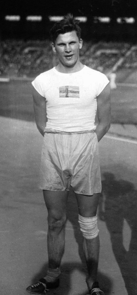 Suède-France athlétisme : 110 m. haie : à gauche Wernstrom à droite Petterson : [photographie de presse] / Agence Meurisse